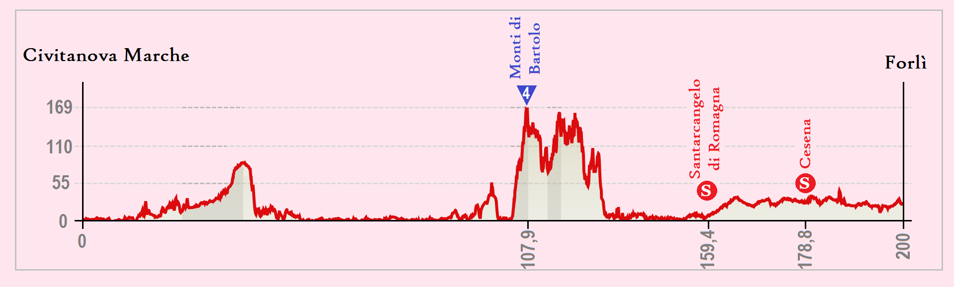 Perfil de la 10.ª etapa del Giro de Itlia 2015